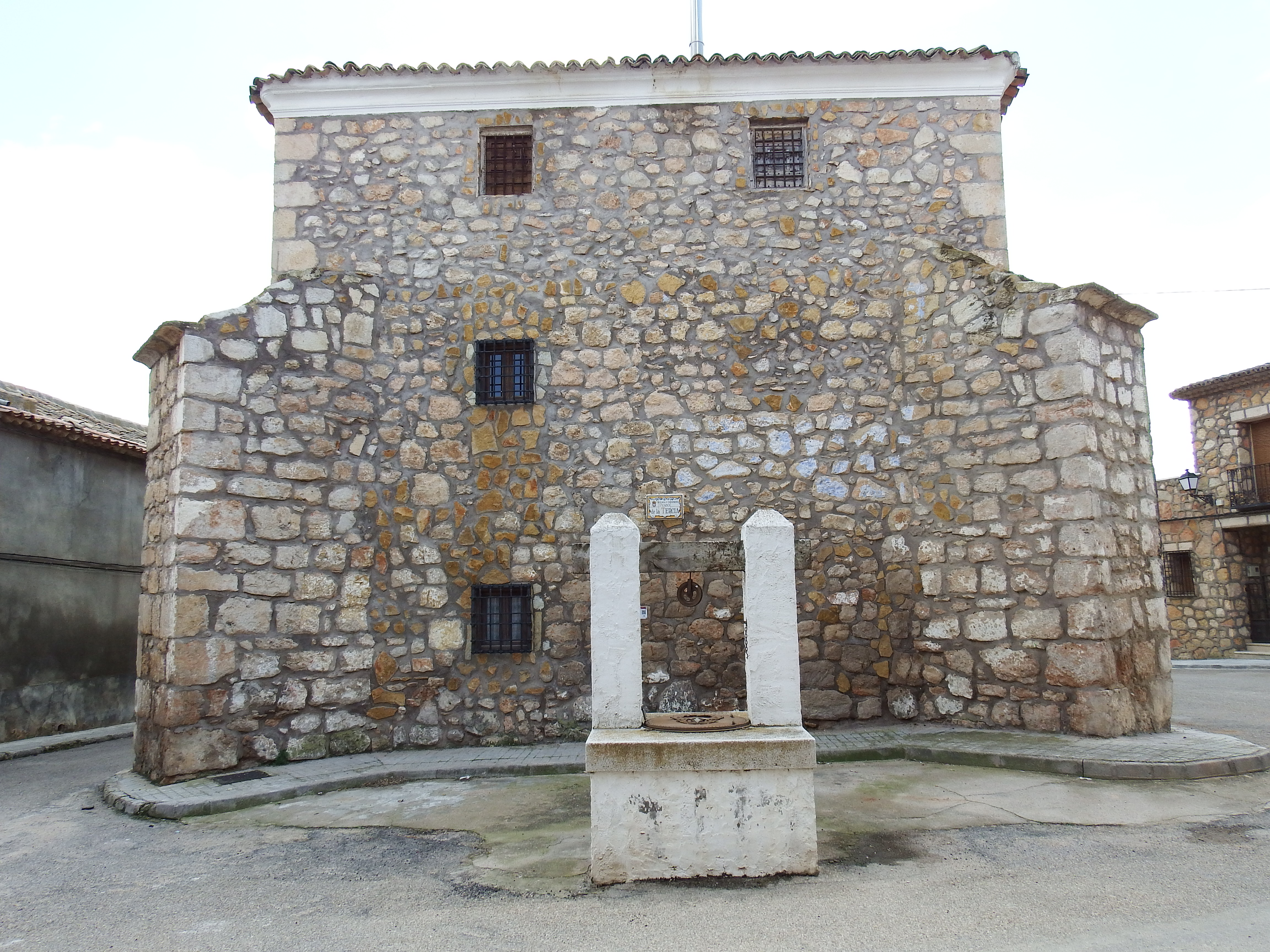 Fotos de Villamayor de Santiago tomadas en Wiki Takes Cuenca 2018